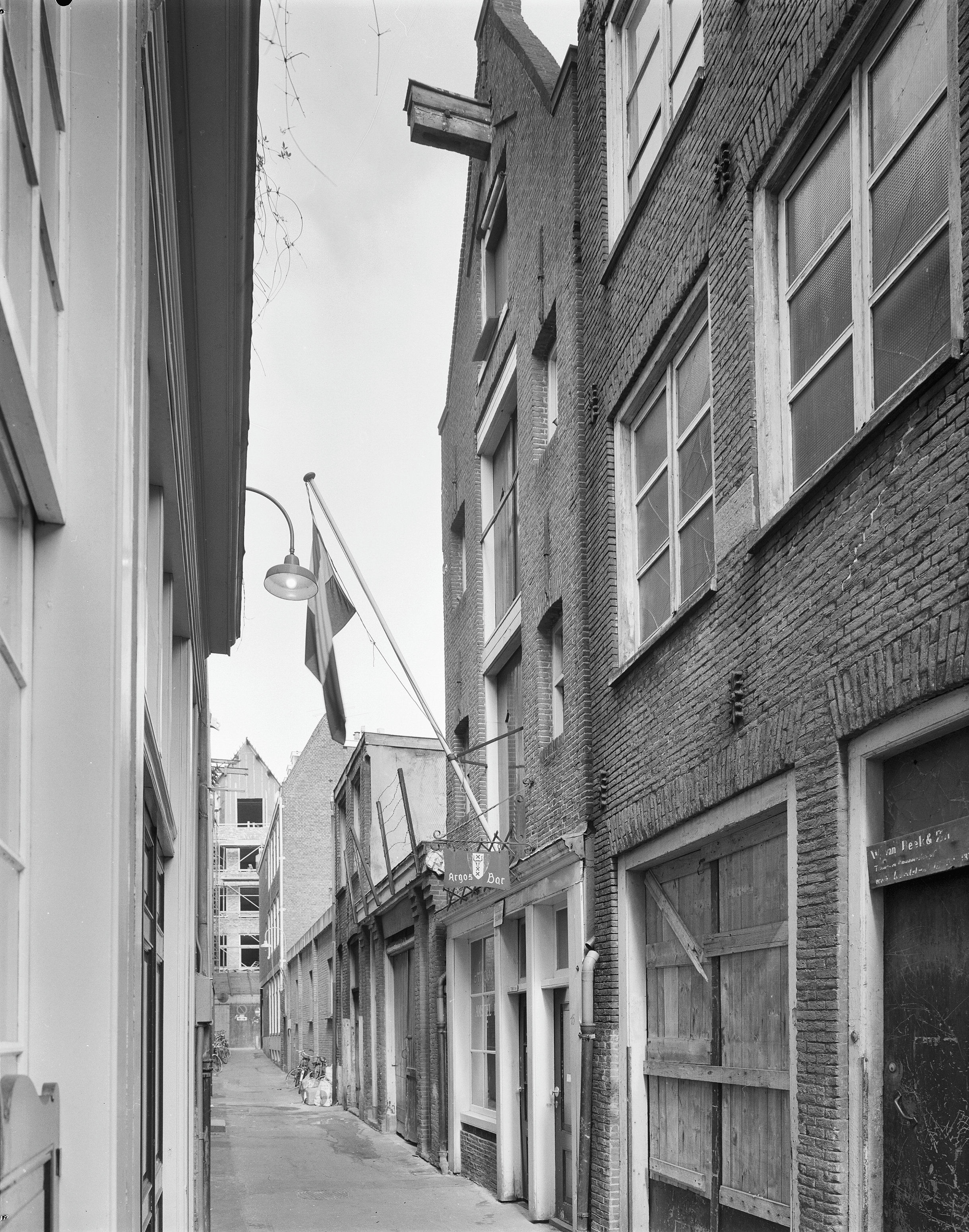 overzicht voorgevel